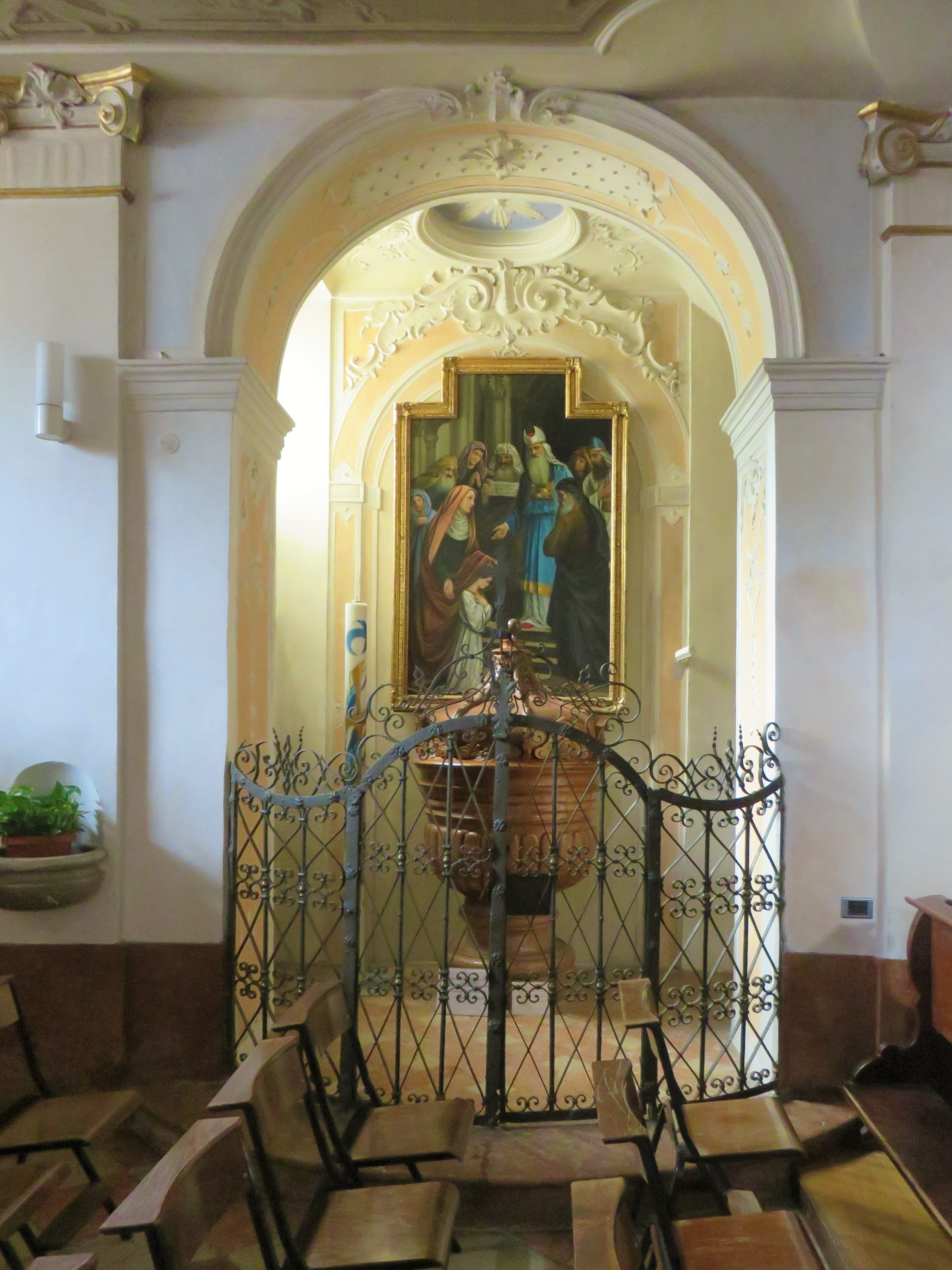 Chiesa di San Giovanni Battista - Interno - Battistero XVIII secolo